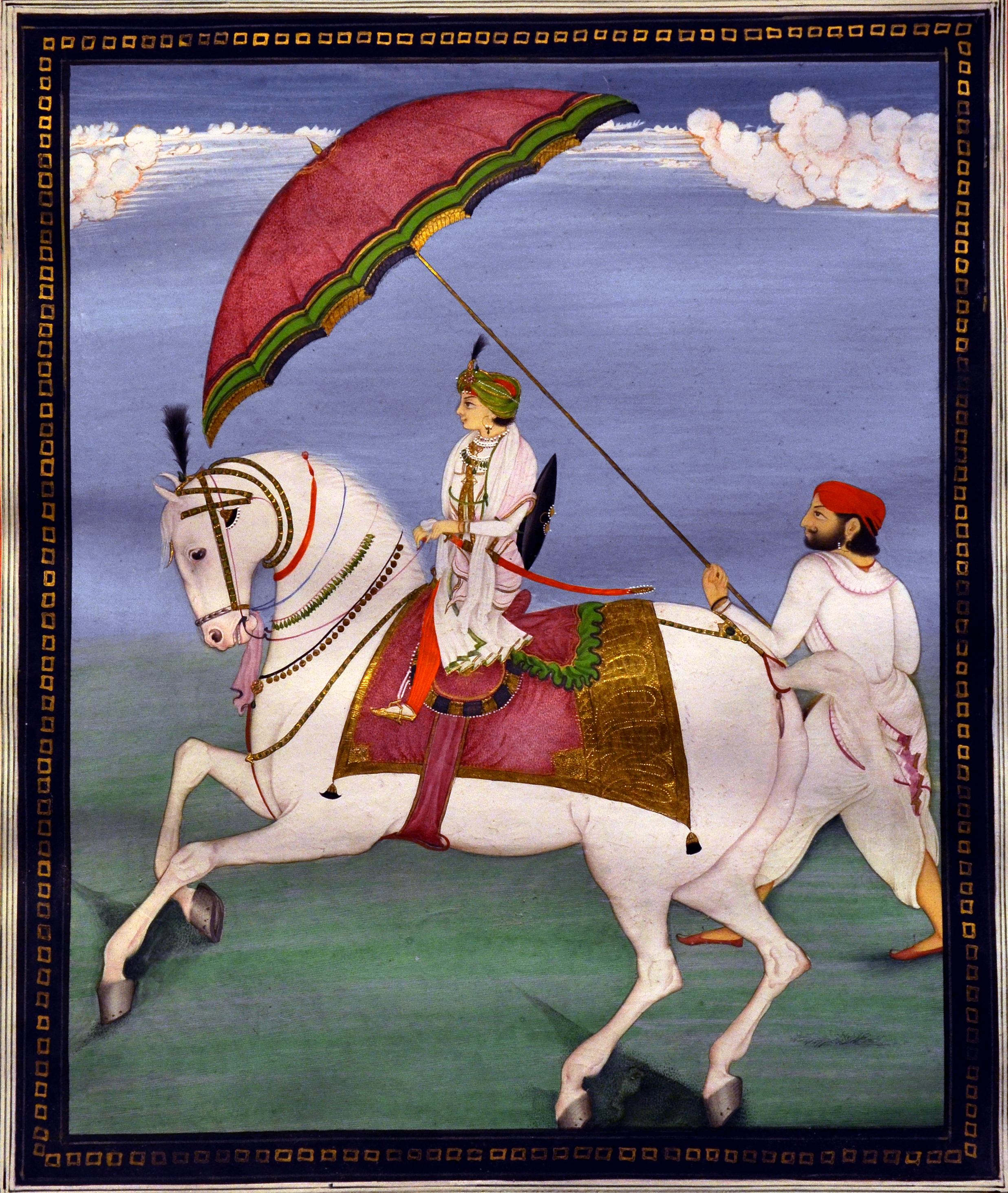 Portrait équestre de Dalip Singh ( 1838-1893 ), gouache et or sur papier, école Pahari, entre 1846 et 1849. Conservé au Musée Guimet ( MNAAG ), référence MA 12543. Présenté dans l'exposition "Ascètes, sultans et maharajahs, Pages indiennes du musée national des arts asiatiques – Guimet", du 19 octobre 2016 au 13 février 2017.